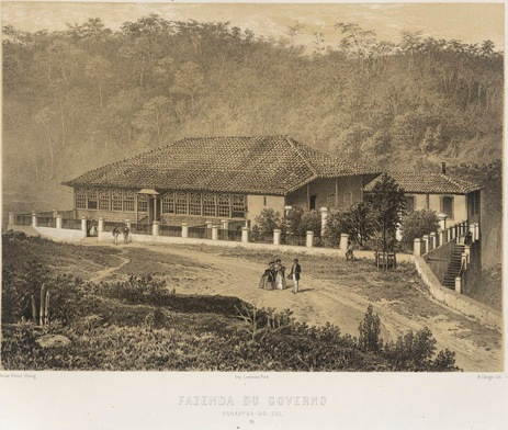 Fotografia da Fazenda da Reforma (Conhecida como Fazenda do Governo) presente em coleção chamada Brazil pittoresco que está disponível virtualmente no site da Fundação Biblioteca Nacional.Endereço eletrônico